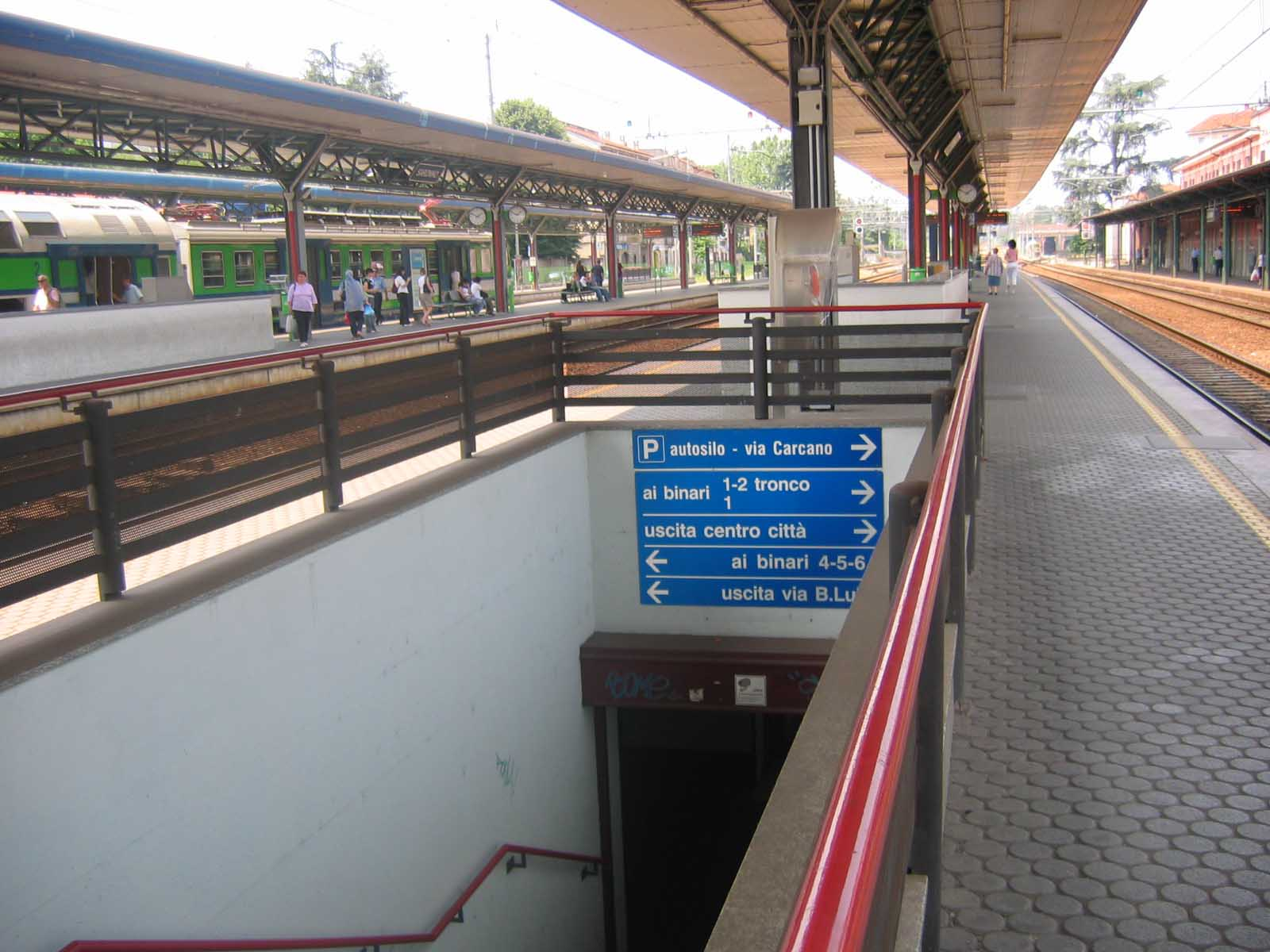 Stazione ferroviaria di Saronno